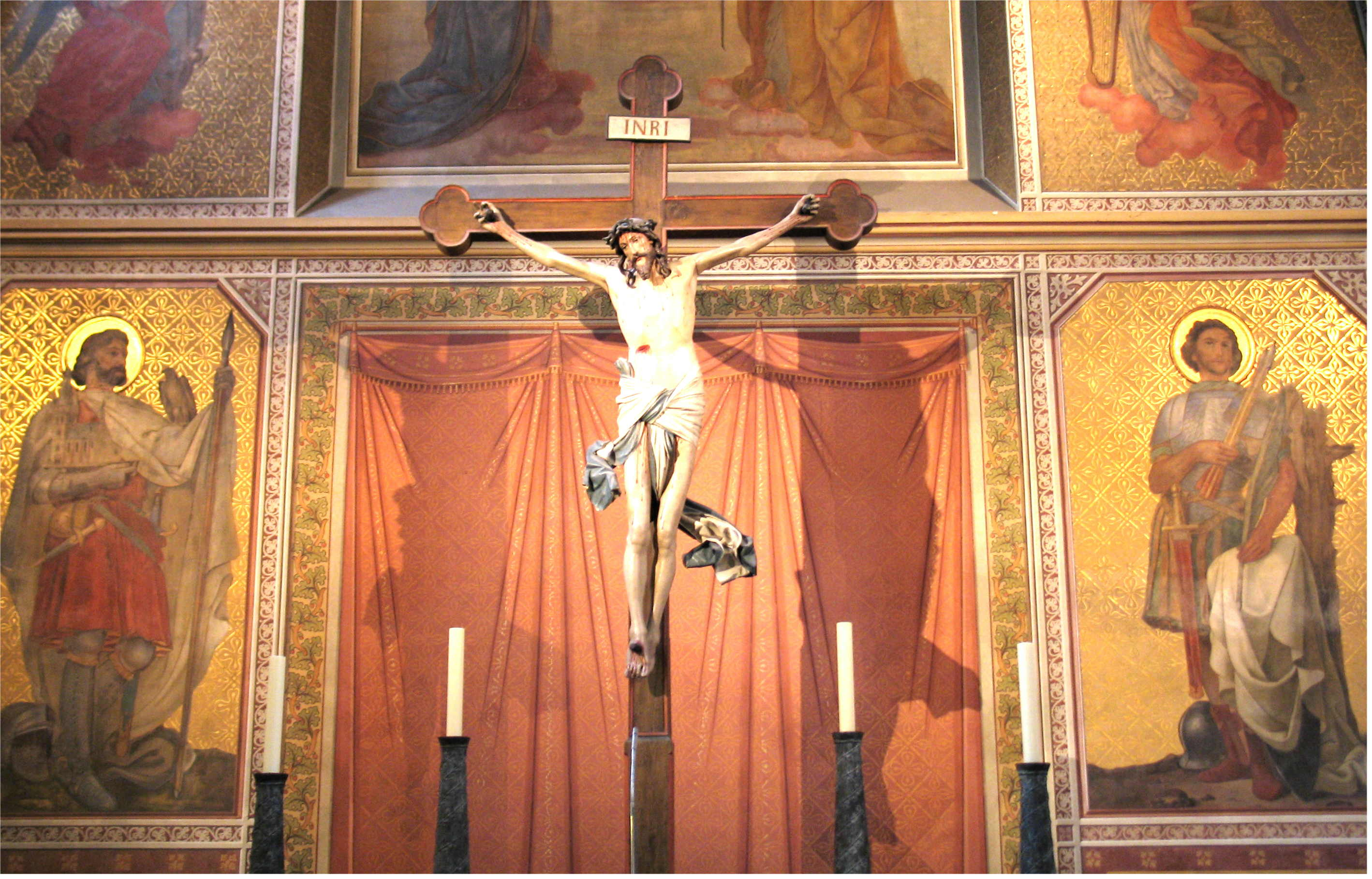 Kräiz am Chouer an der St. Gangolkierch zu Tréier.